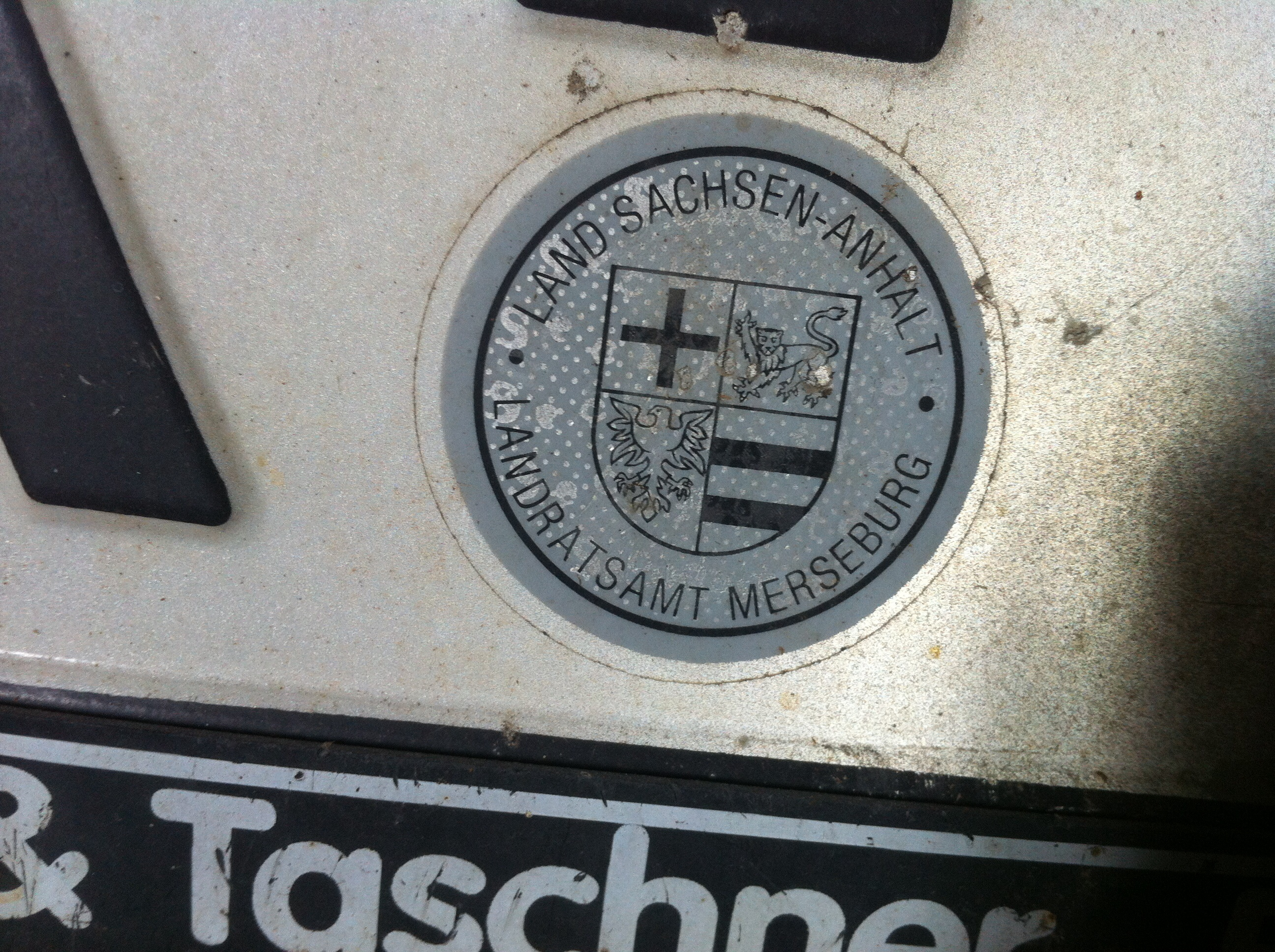 Das Wappen des Landkreises am KFZ-Kennzeichen 1990-1994